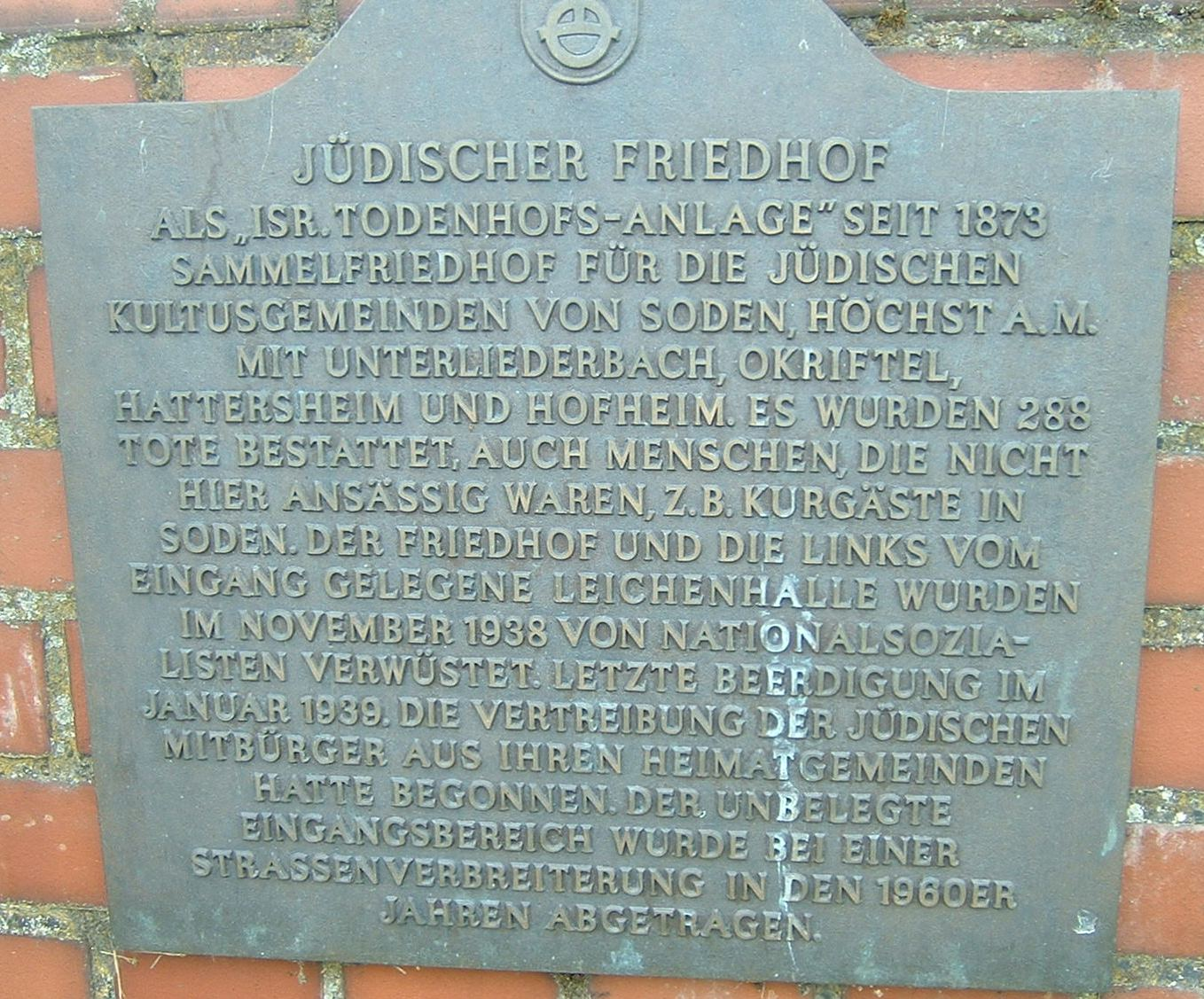 Liederbach am Taunus, Jüdischer Friedhof, Taunusstraße (entgegen der Dateibezeichnung handelt es sich um den Friedhof in Bad Soden)